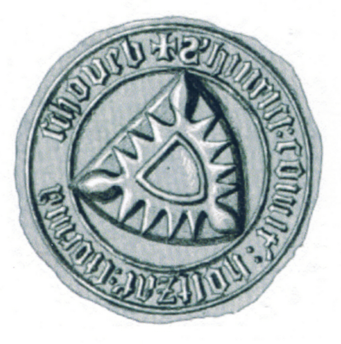 Siegel des Heinrich III. von Schauenburg-Holstein († Februar 1421 in Bordesholm), Bischof von Osnabrück (1403-1404) und Herzog von Schleswig und Graf von Holstein. Er war der jüngste Sohn von Heinrich II. und dessen Frau Sofia auf Werle. Das Siegel stammt aus der Zeit um 1402.